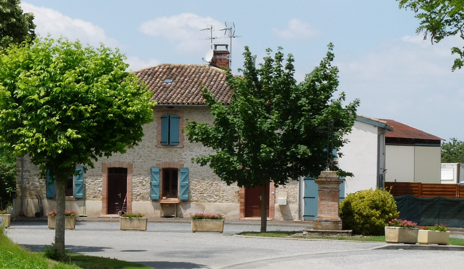 Croix, Albiac, Haute-Garonne, France